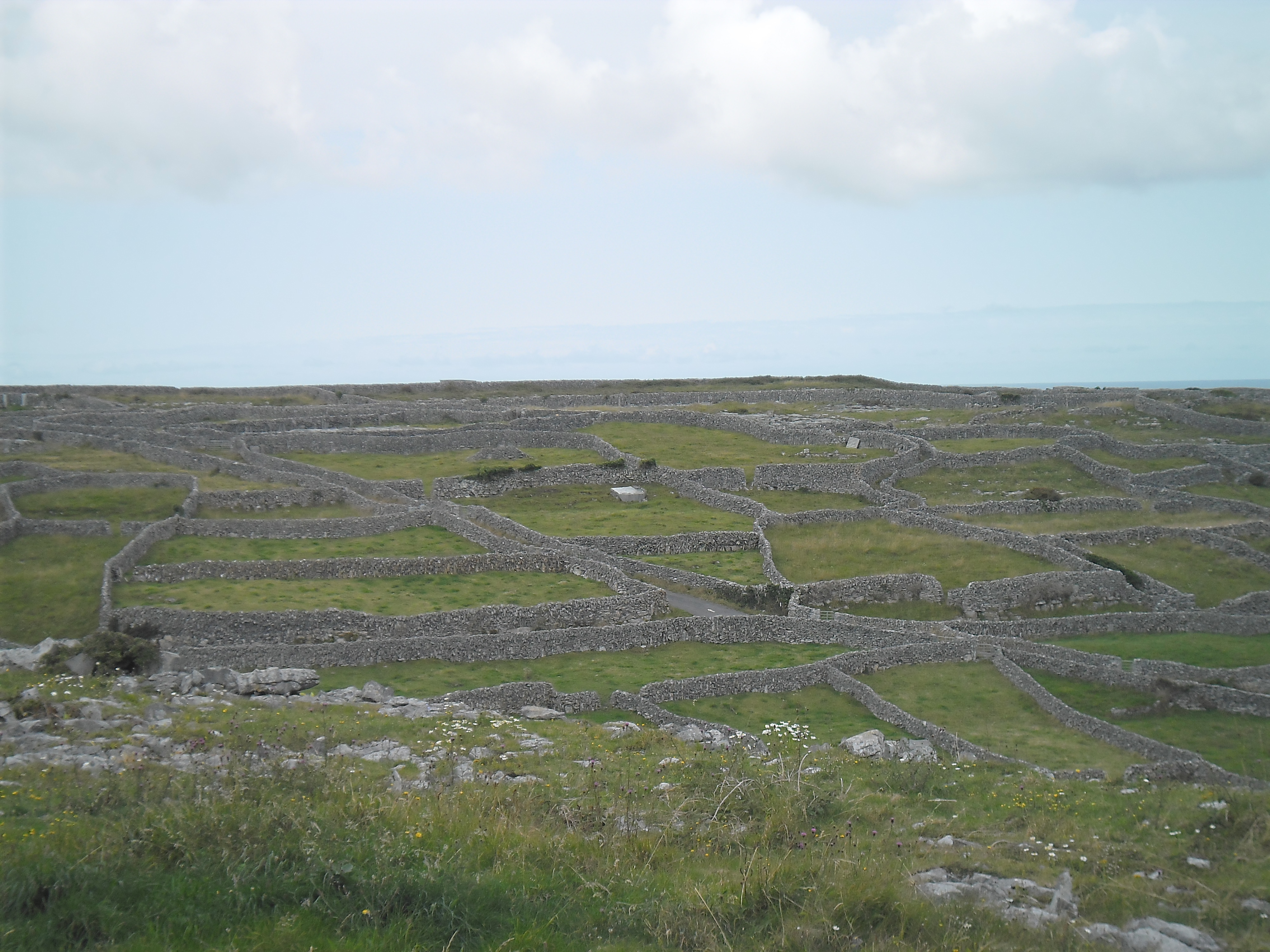 Murets typique sur Inisheer, îles d'Aran